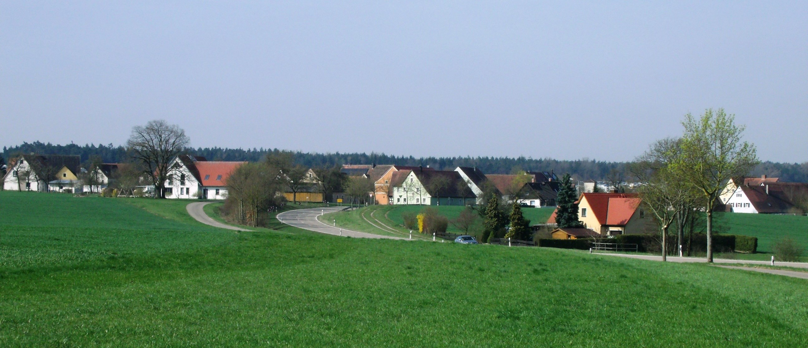 Hannenbach, Ortsteil von Leutershausen im Landkreis Ansbach